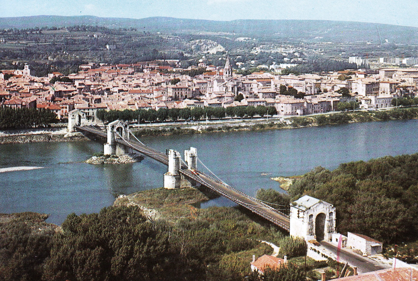 vue générale de Bourg Saint Andéol Ardèche - ancien pont